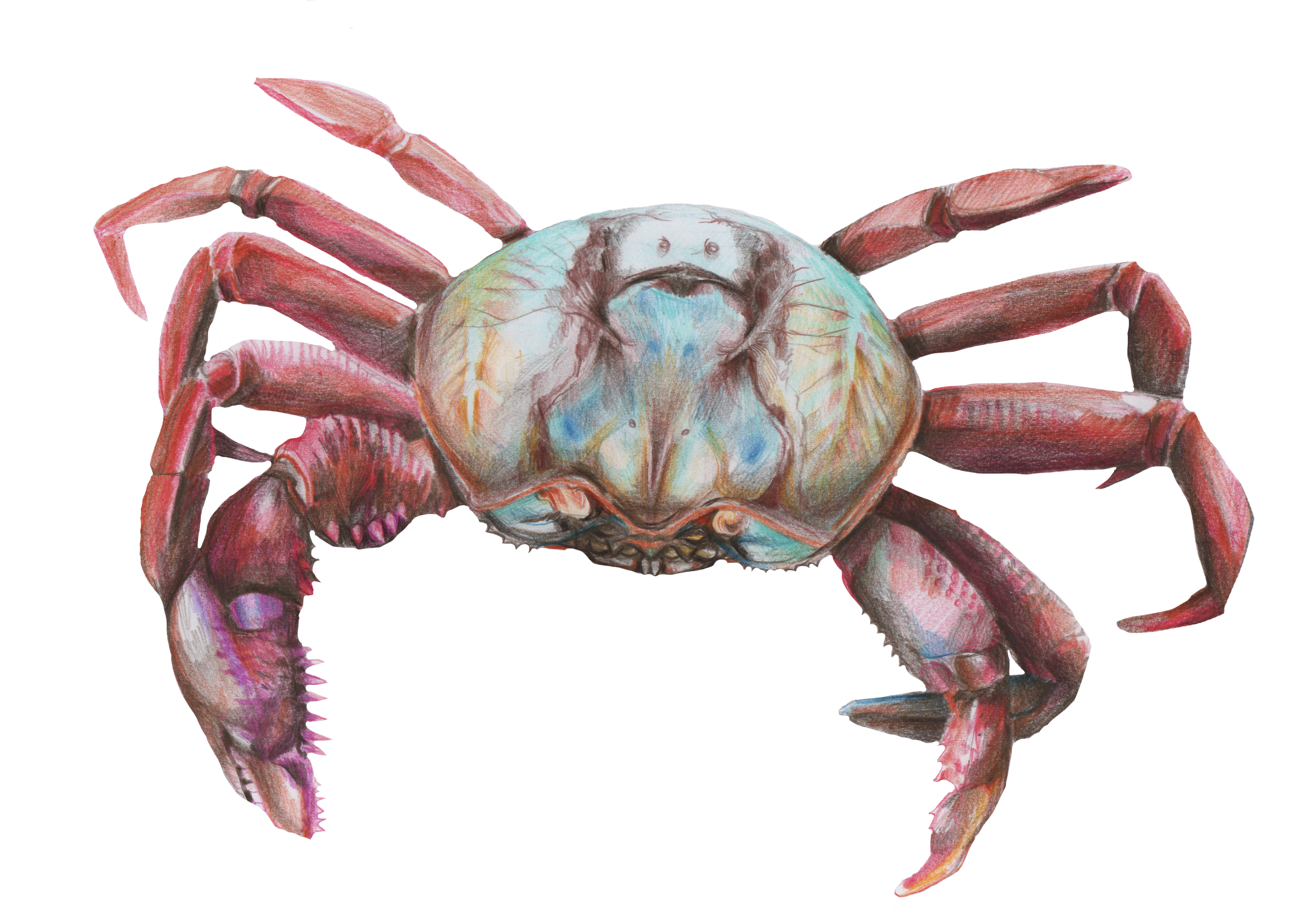 Desenho à lápis do caranguejo uçá . Desenho originalmente comissionado pela ONG Rare Brazil (